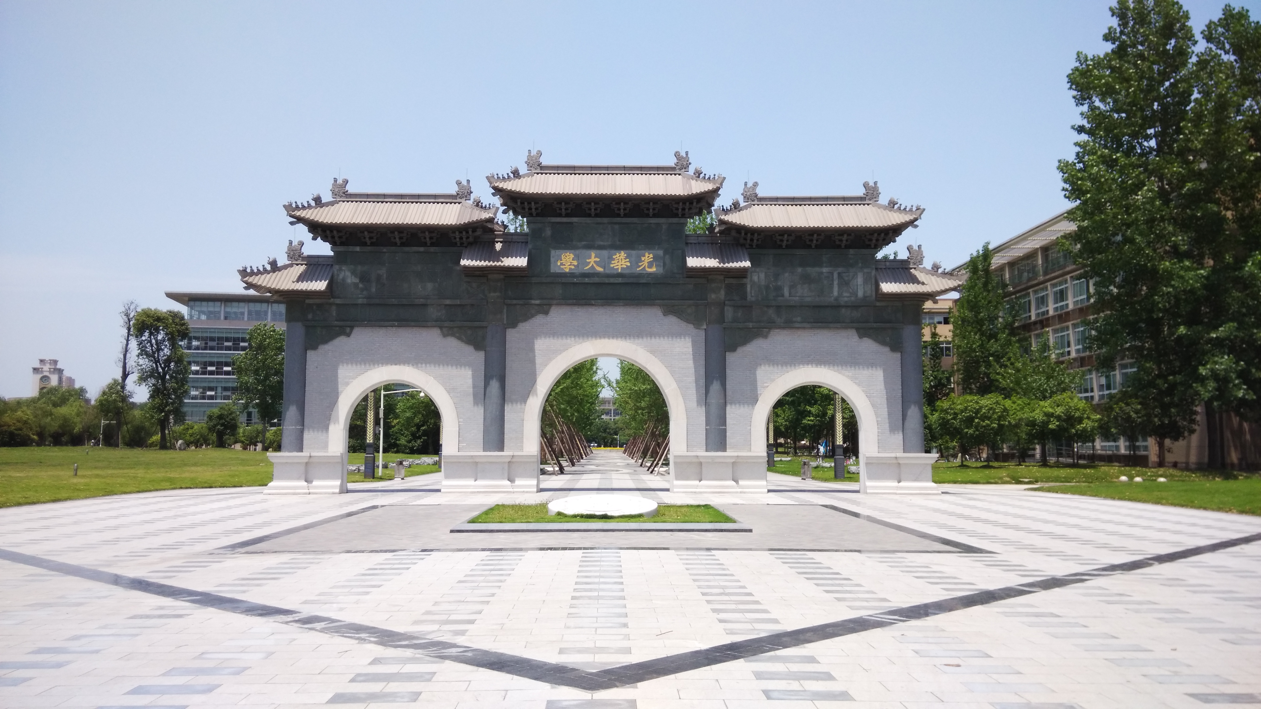 SWUFE Guanghua Gate on Liulin Campus, Wenjiang District, Chengdu City, Sichuan Province, China